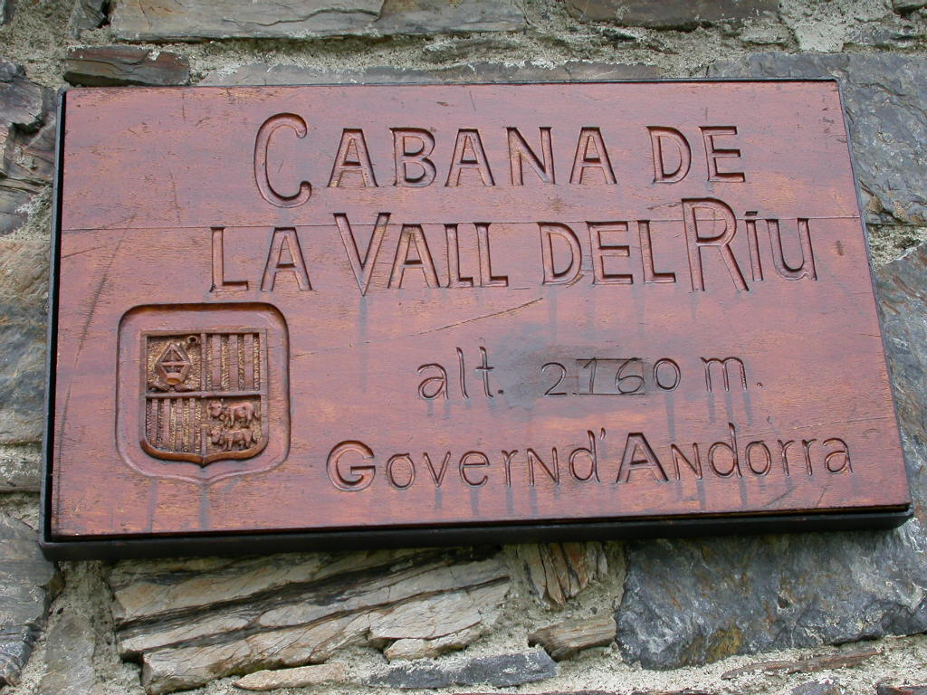 Refuges Andorre